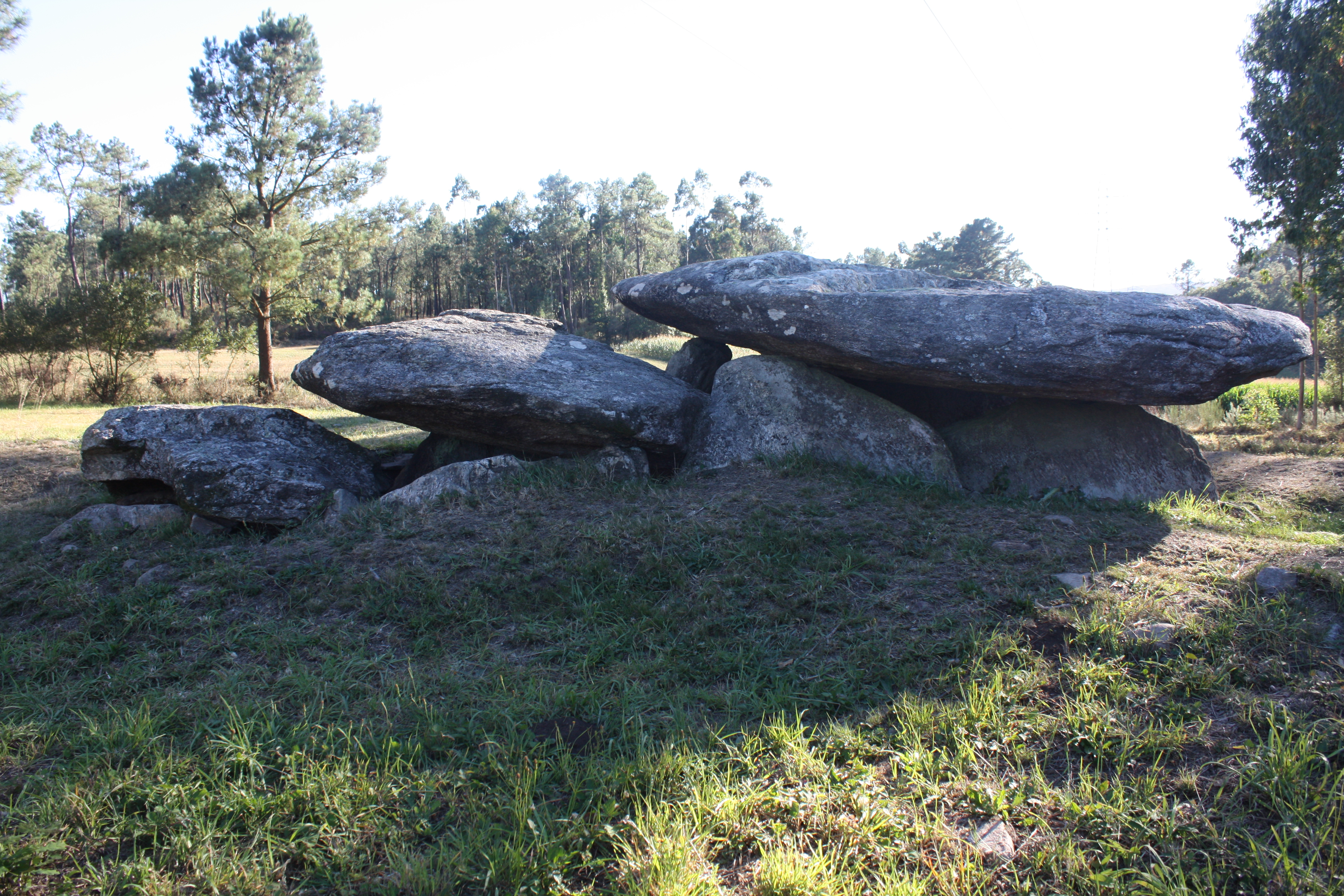 Dolmen de Pedra da Arca, en Regoelle, Olveira, Dumbría